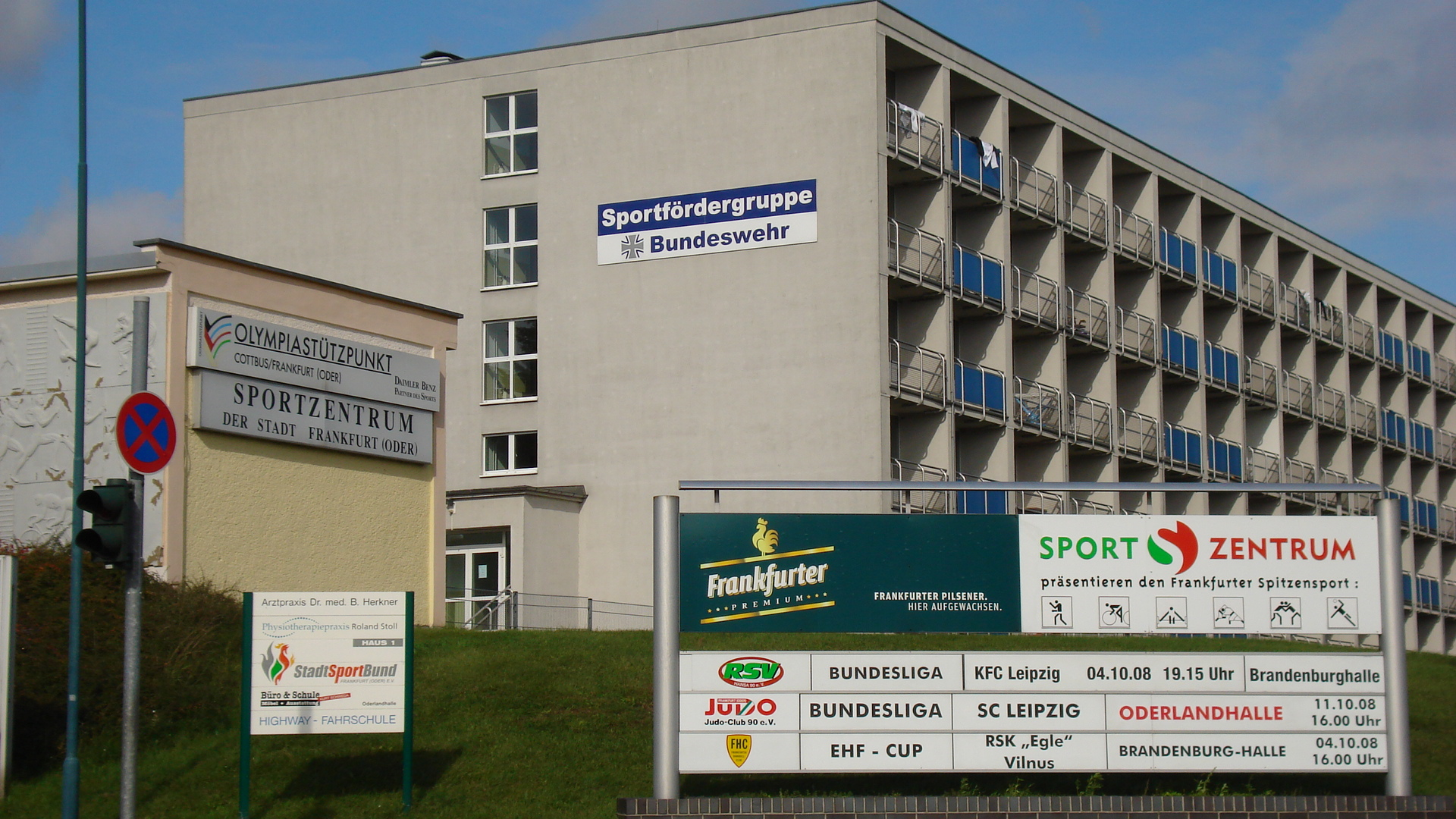 Internat der Sportfördergruppe der Bundeswehr im Sportzentrum Frankfurt (Oder), Brandenburg, Deutschland